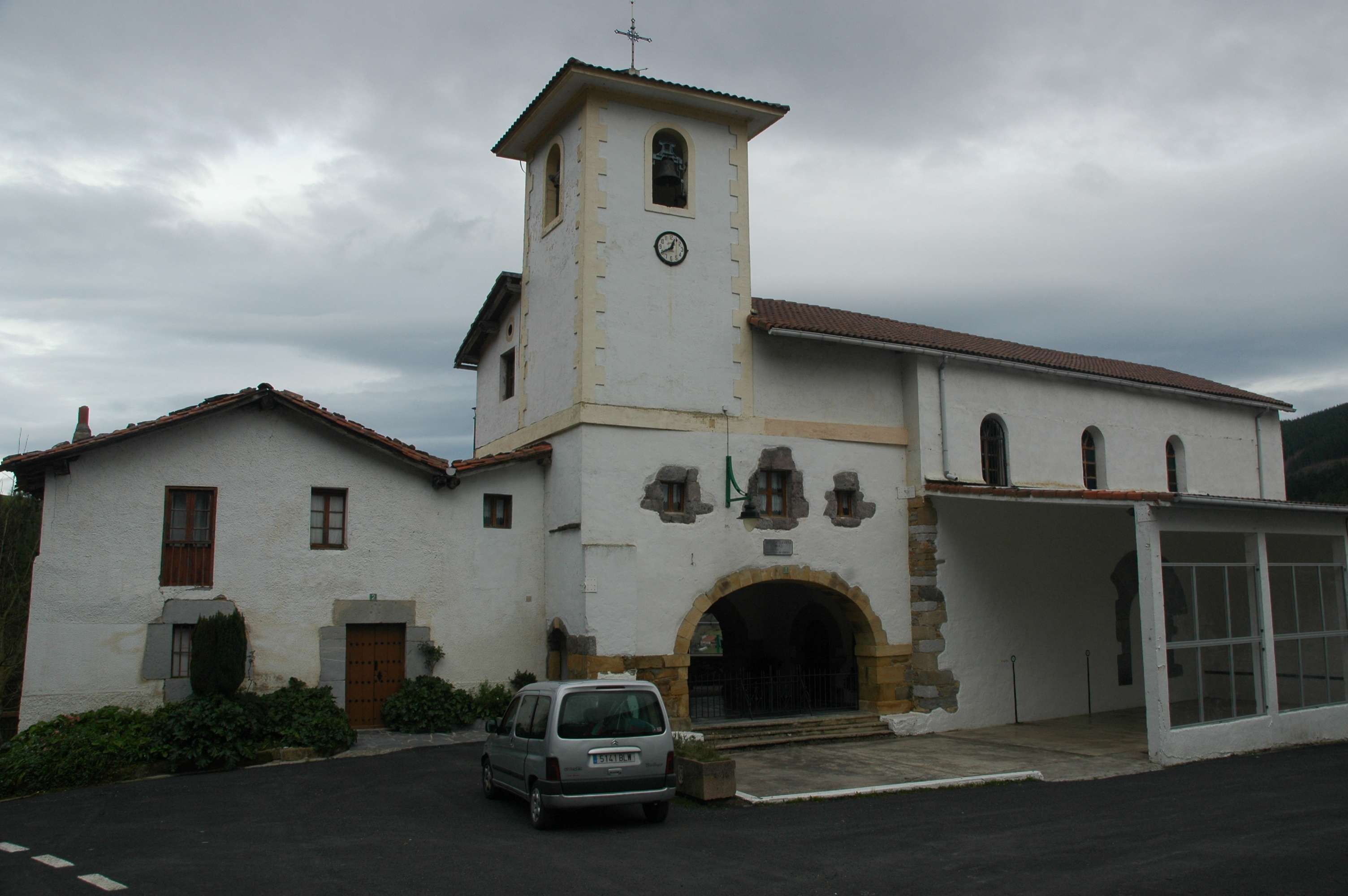 Eibarko Agiñagako San Migel eliza.